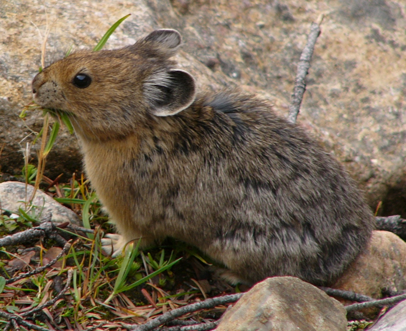 Amerikanischer Pfeifhase (Pika) in den Kanadischen Rocky Mountains.